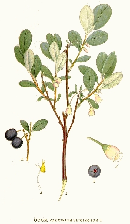 Original Description Odon, Vaccinium uliginosum L.